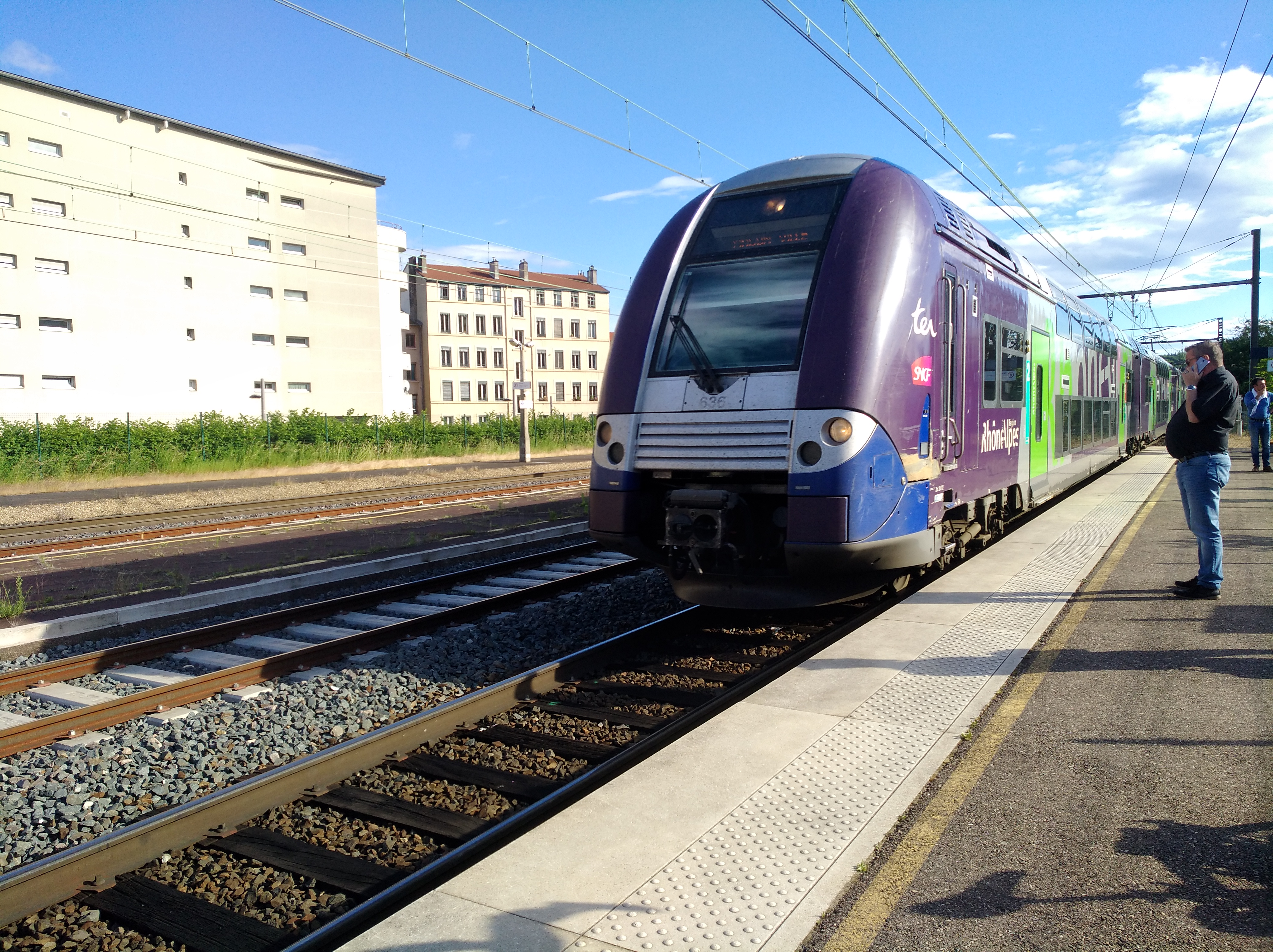 Train Z 24635/636 (de la classe Z 24500 de la SNCF), arrivant en gare de Lyon-Vaise et en direction de Mâcon-Ville.